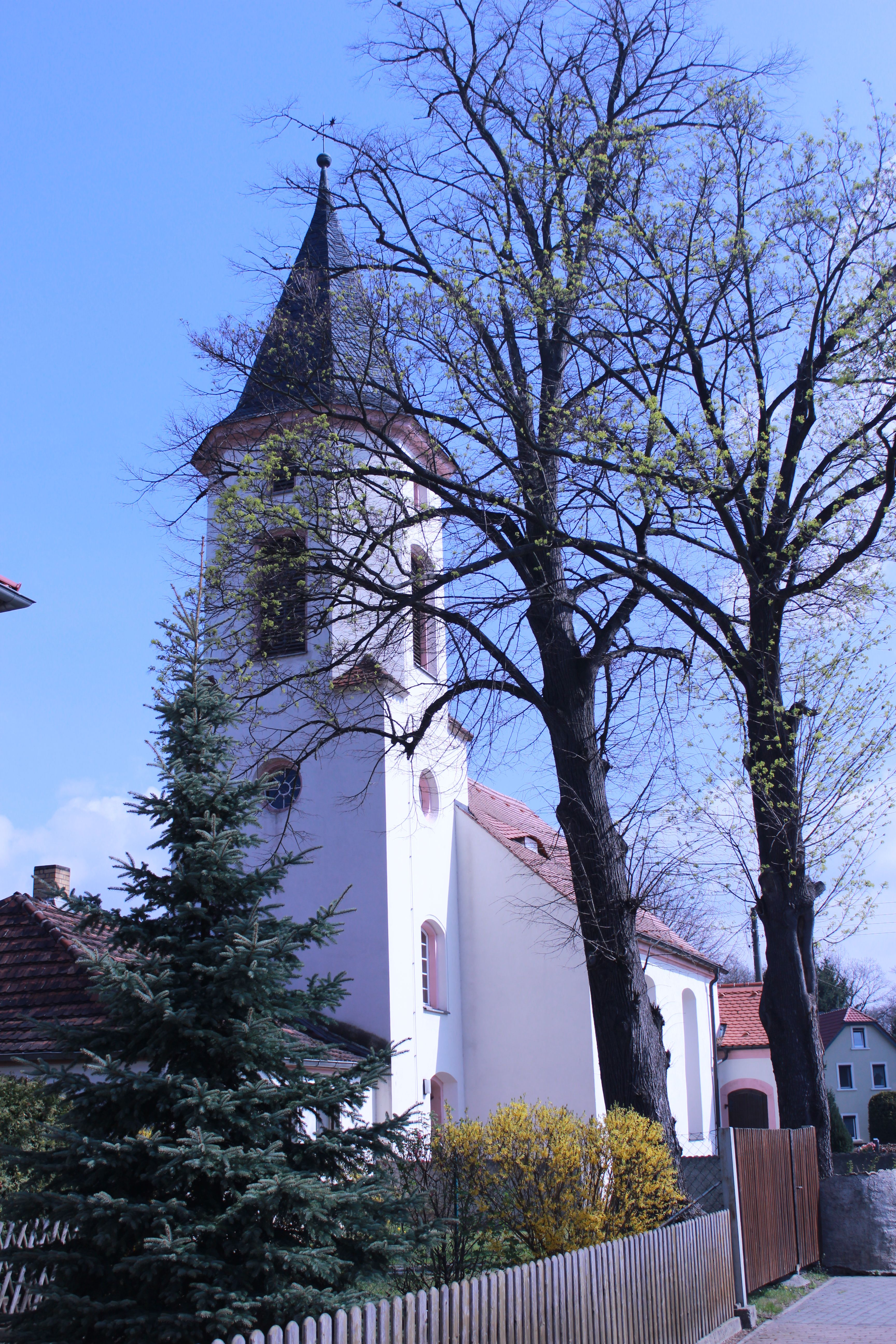 Koselitz.